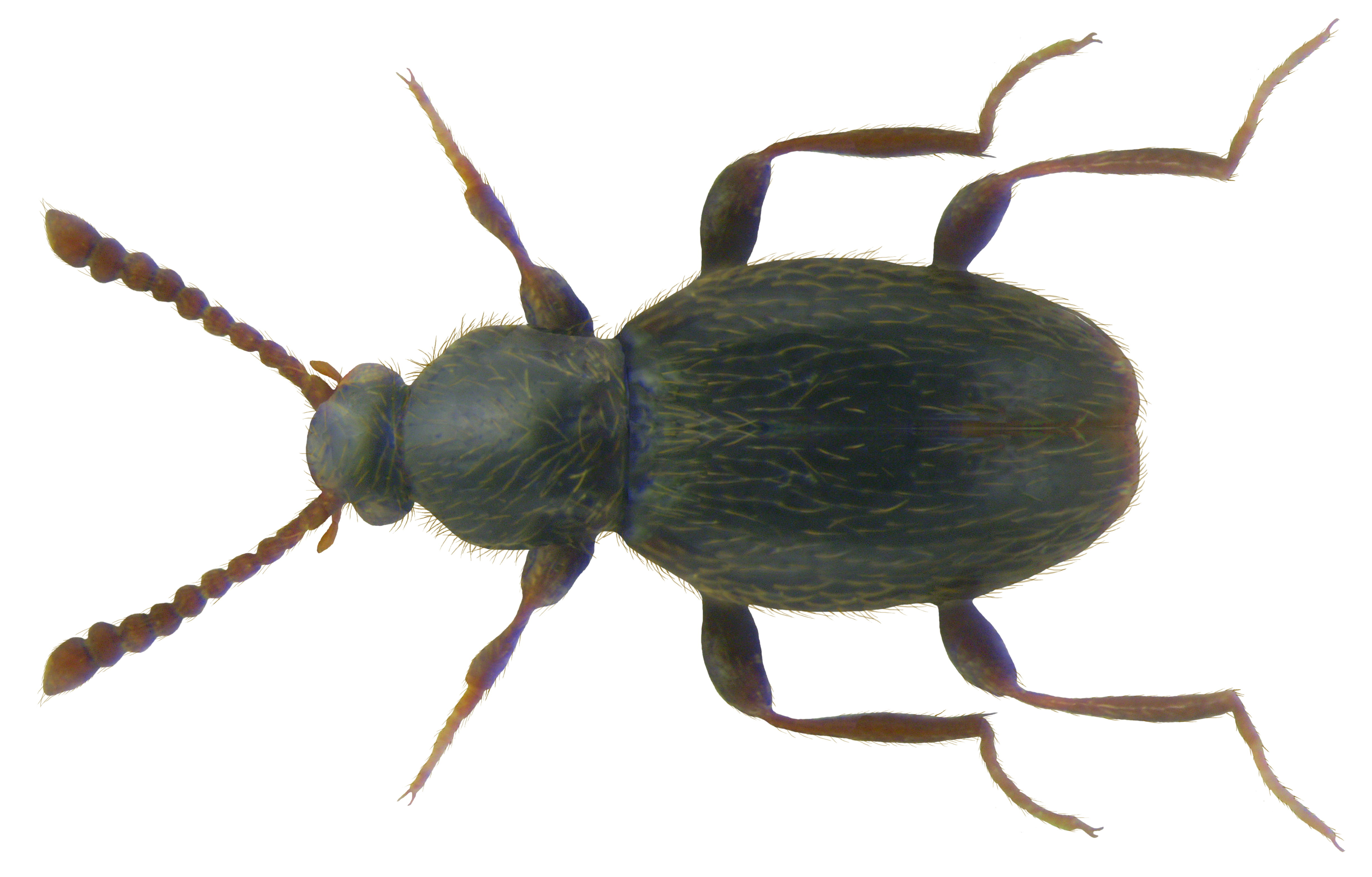 Familie: Scydmaenidae Grösse: 1,55-1,7 mm Verbreitung: Europa, Kaukasus Ökologie: terricol in Waldstreu, Mulm und Humus Fundort: Germania Bayern, Oberfranken, Kulmbach leg.det. U.Schmidt, 1981 Foto: U.Schmidt, 2009